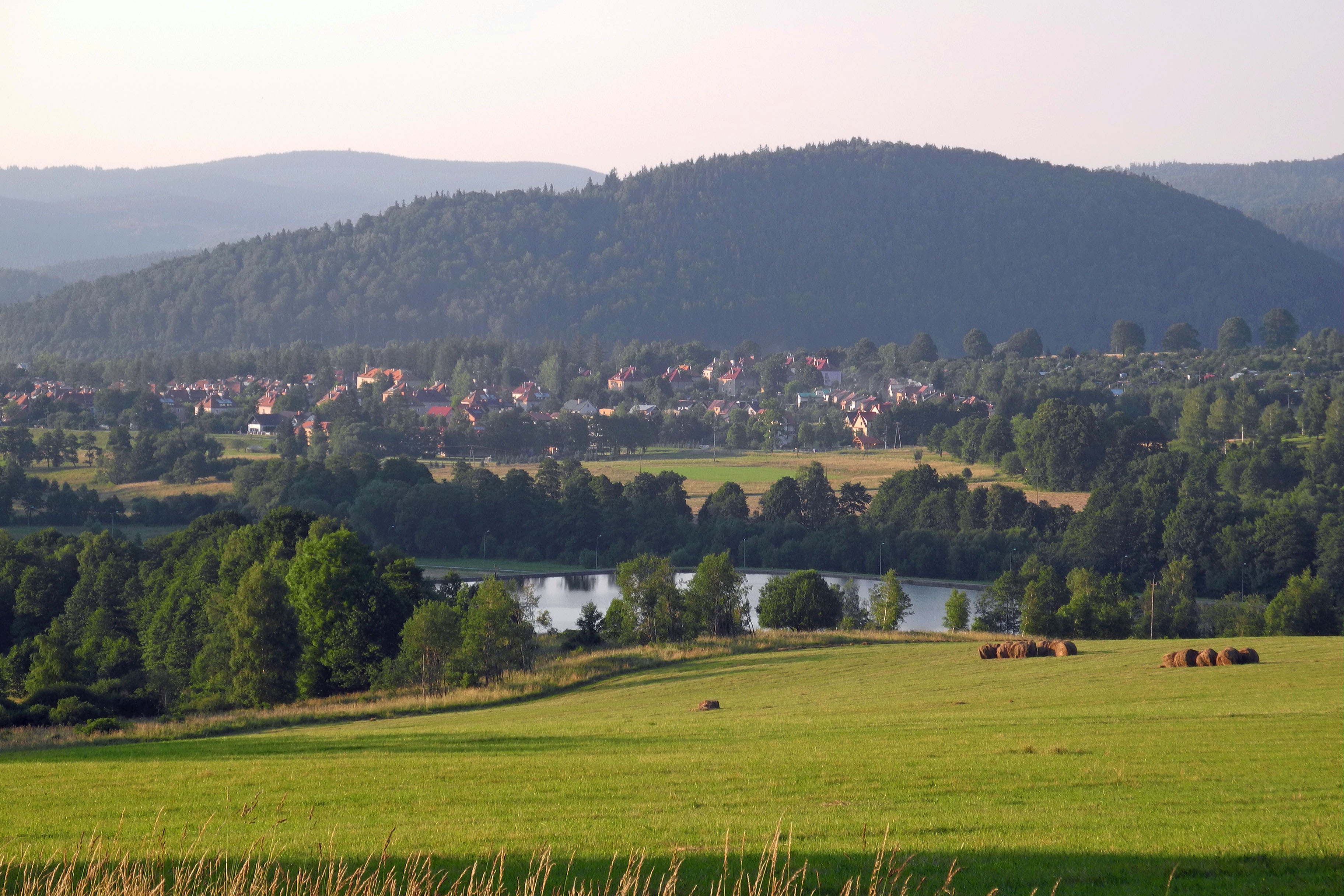 Blick auf Seitenberg (Stronie Śląskie)